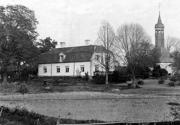 Aspnäs Herrgård i slutet av 1890-talet eller början av 1900-talet.